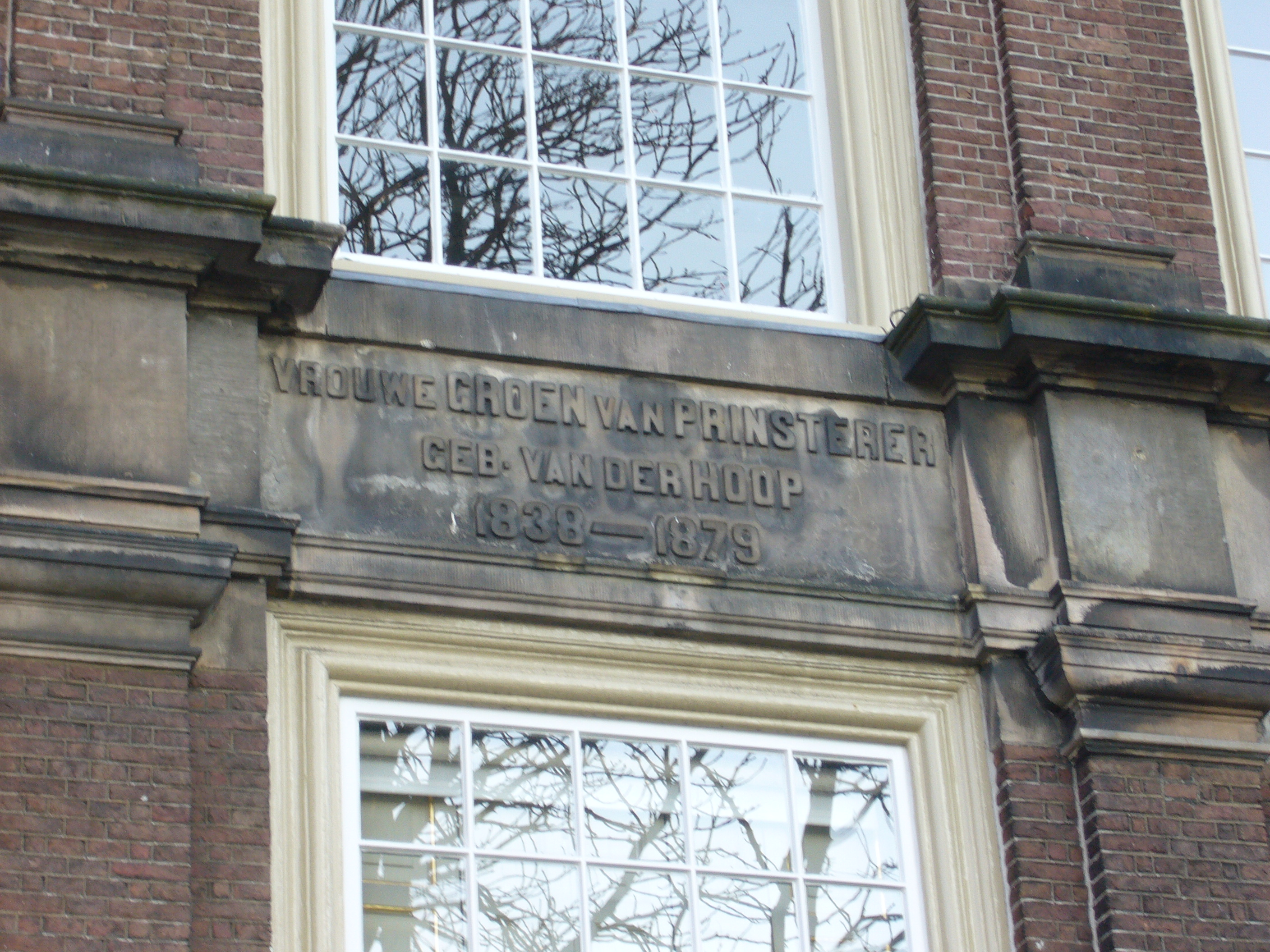 Betsy van der Hoop, gevelsteen